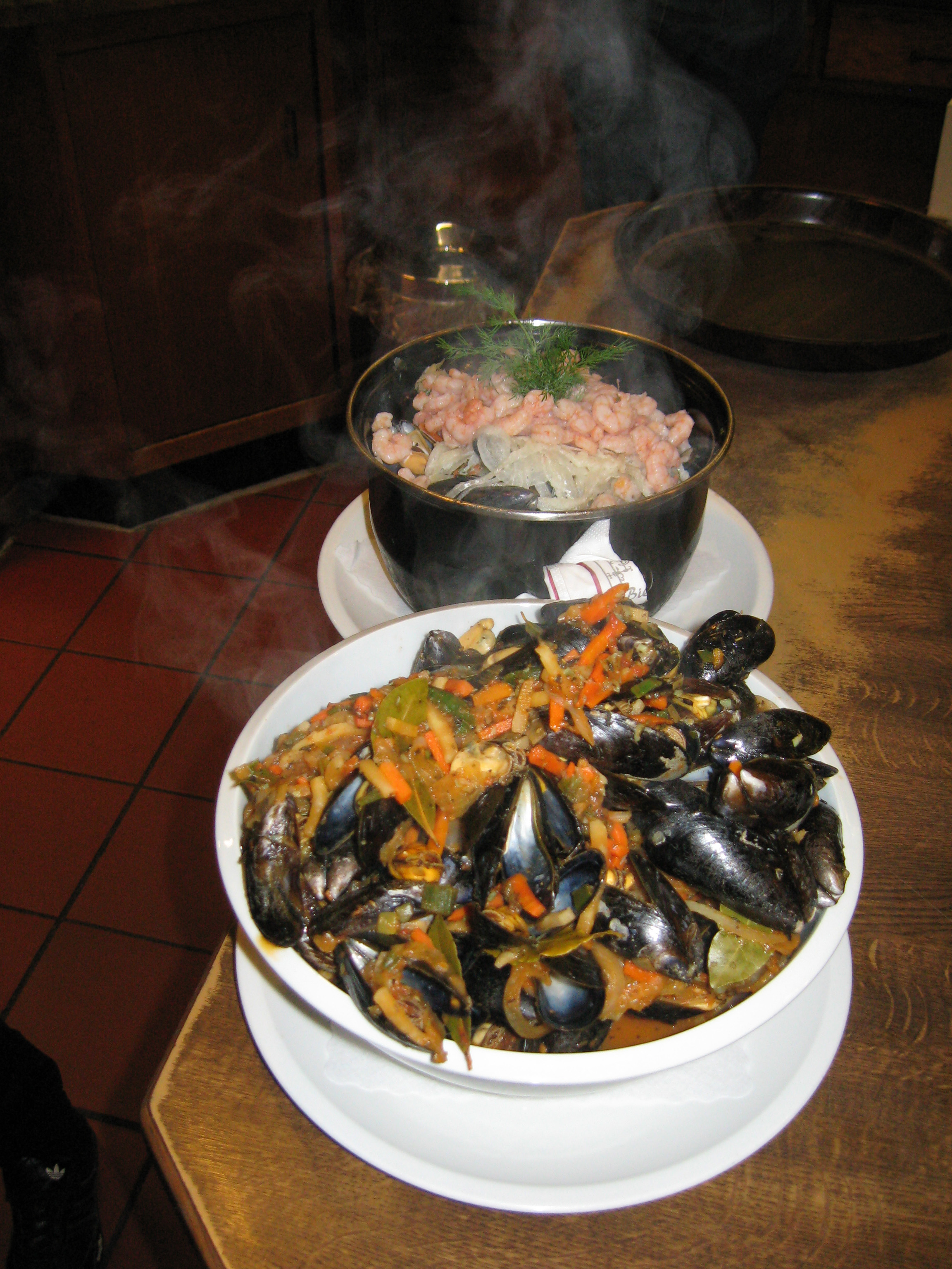 Miesmuschelspezialitäten in Kölns ältestem Muschelhaus "Bieresel" (Gaststätte seit 1297) Datum: 21.01.2011 Urheber: B. Neulich alias Benutzer:Neulich im Roxy Kino Quelle: Privates Fotoarchiv des Urhebers